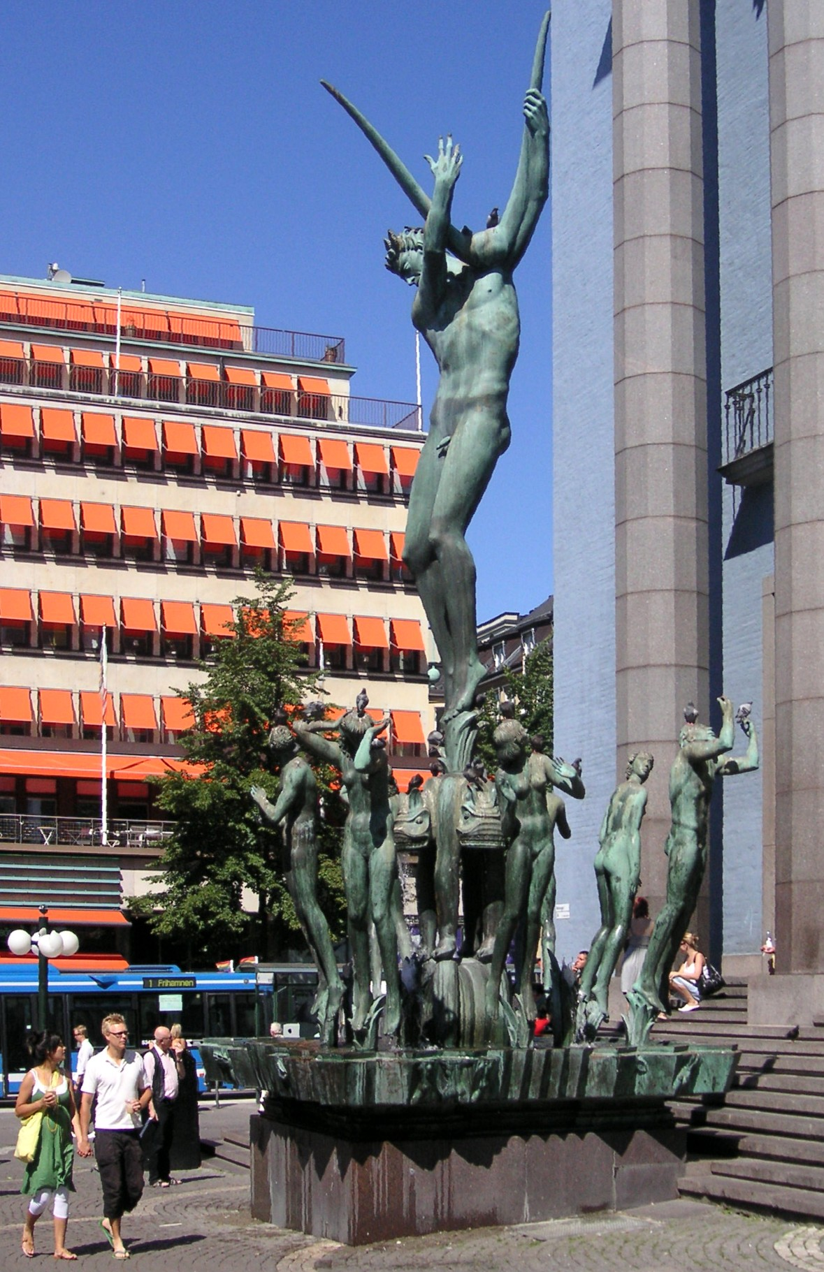 Carl Milles "Orfeusgruppen" vid Konserthuset i Stockholm